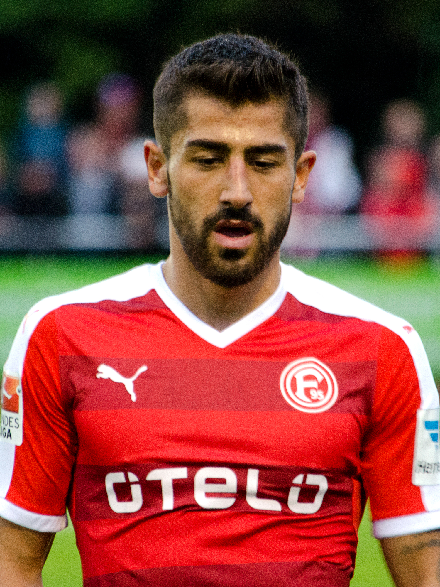 Kerem Demirbay, deutscher Fußballspieler